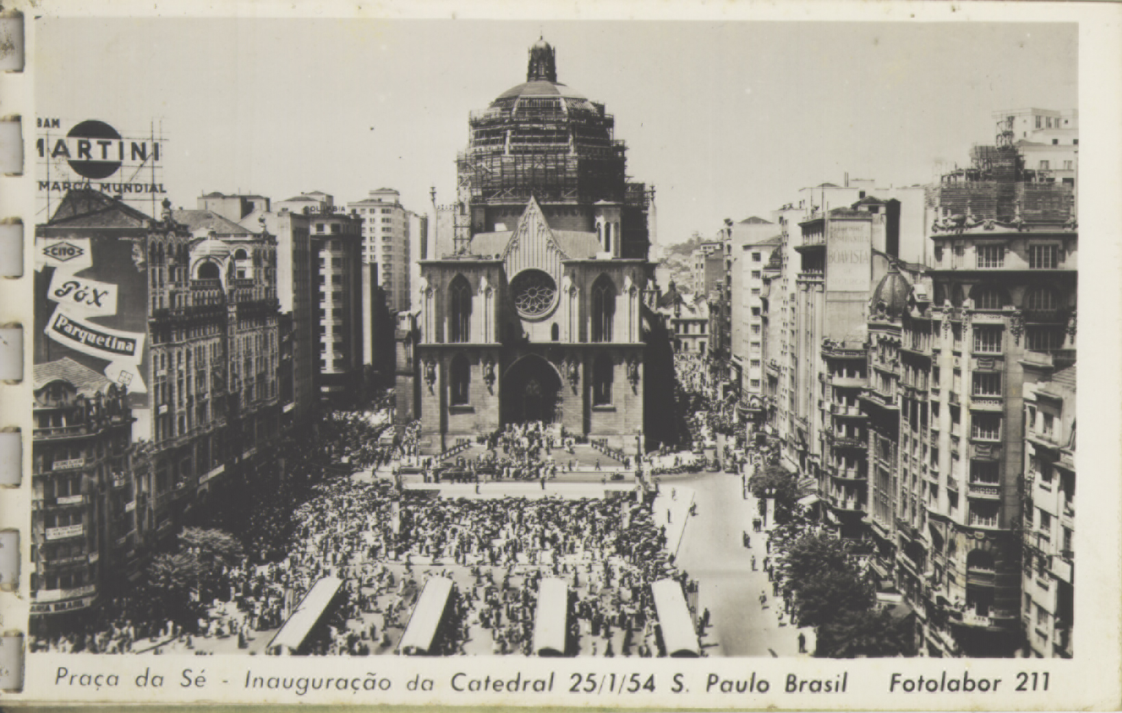 Obra que integra o acervo do Museu Paulista da USP. Coleção Werner Haberkorn